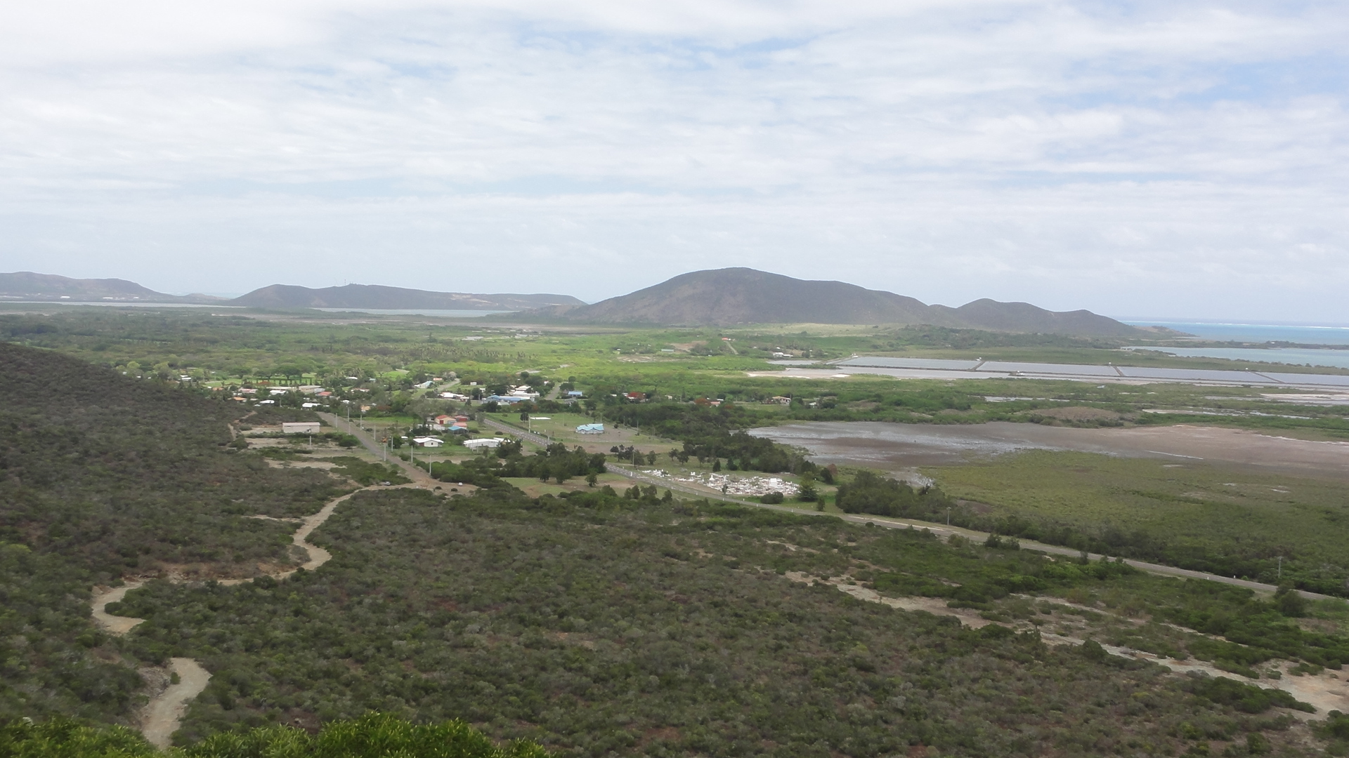 Vue sur Voh